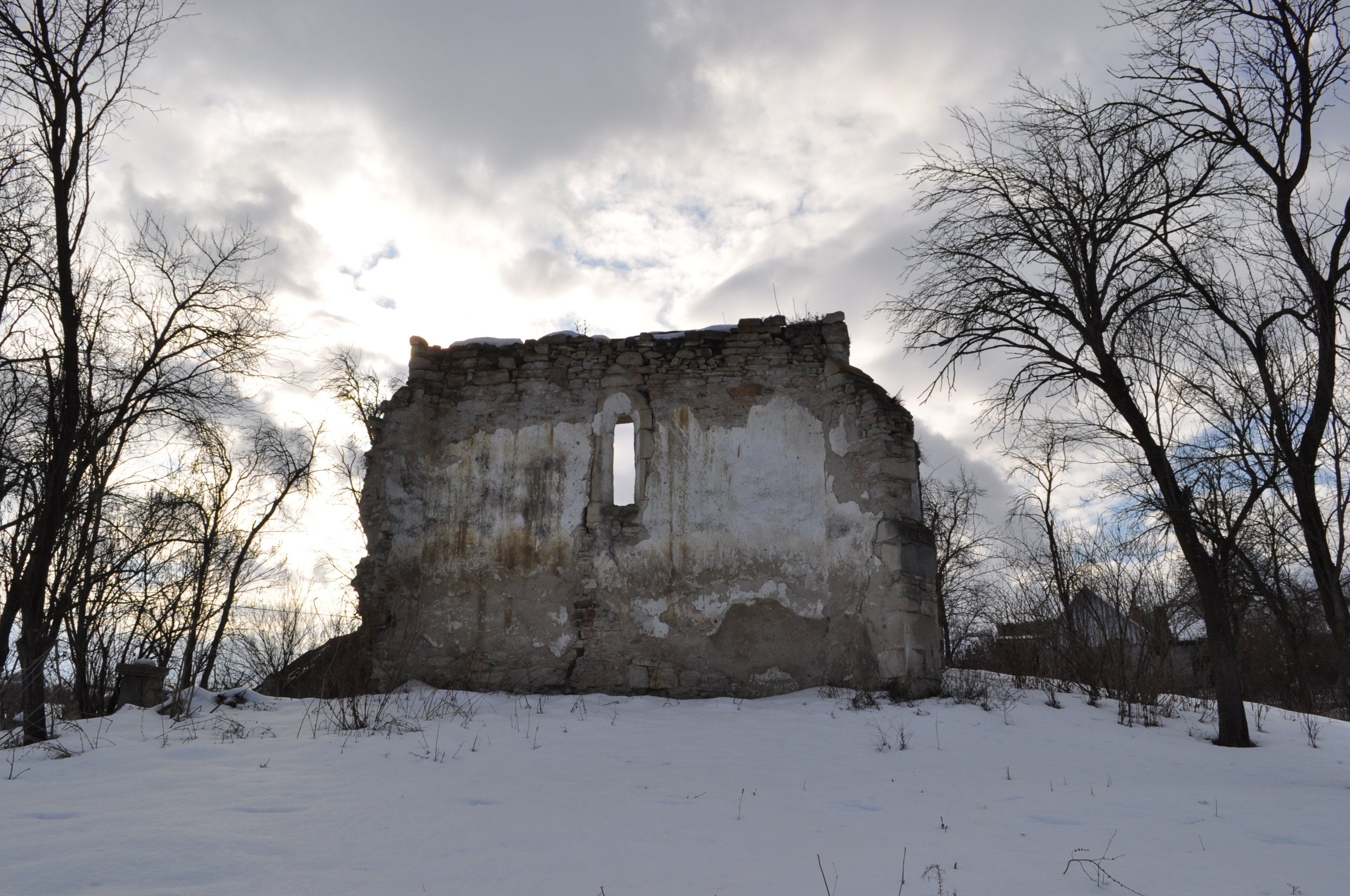 Biserica reformată, sat ORMAN; comuna ICLOD 01